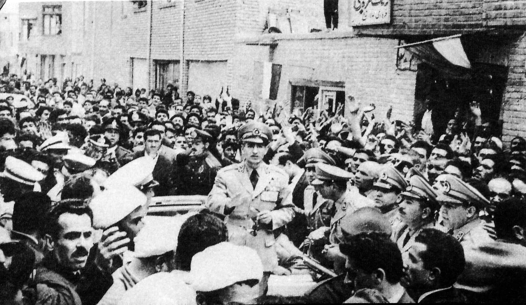 Le Chah paradant dans le sud de Téhéran en 1341 (1962)